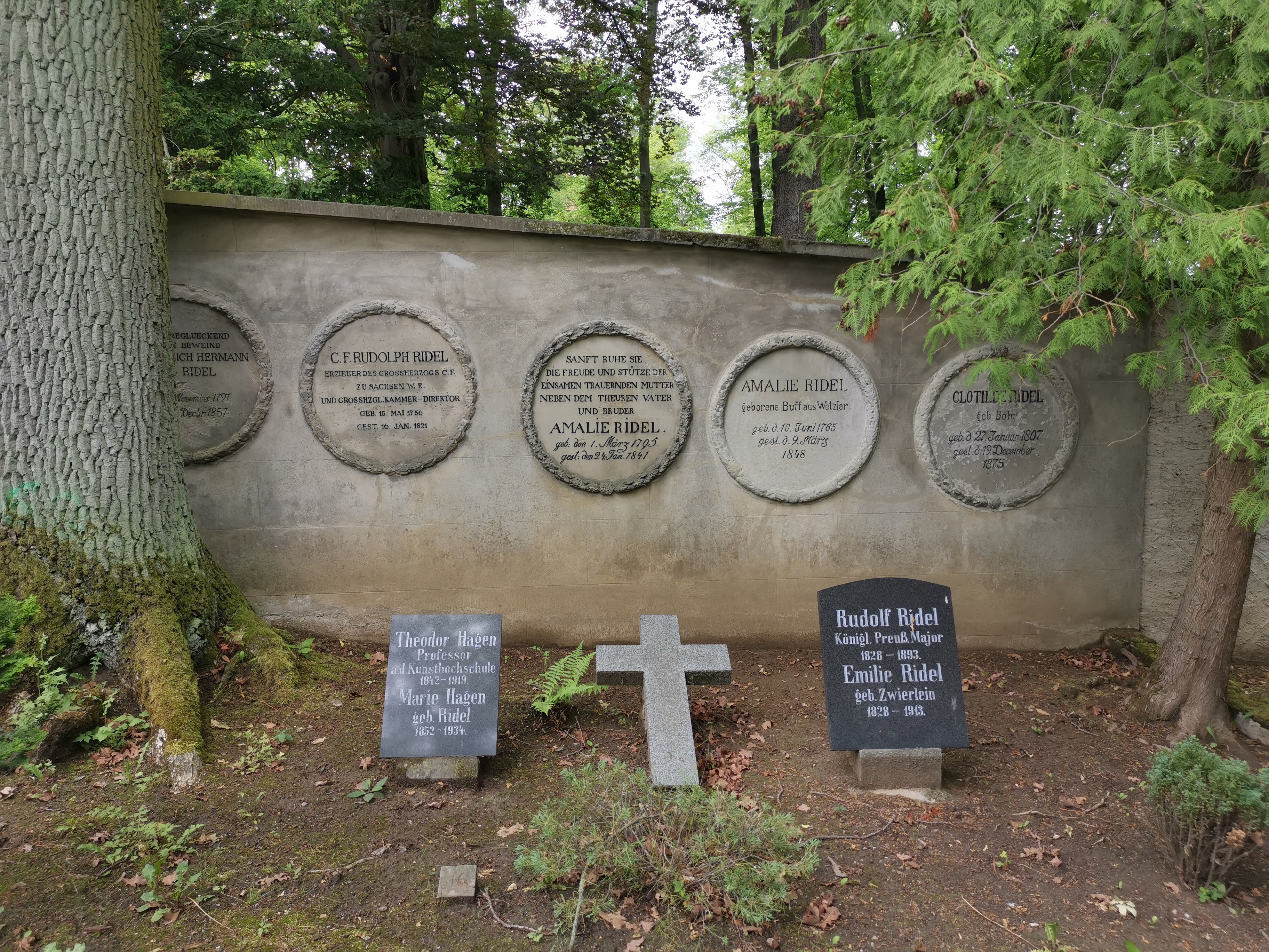 Grabstätte Familie Ridel und von Prof. Theodor Hagen; Historischer Friedhof Weimar